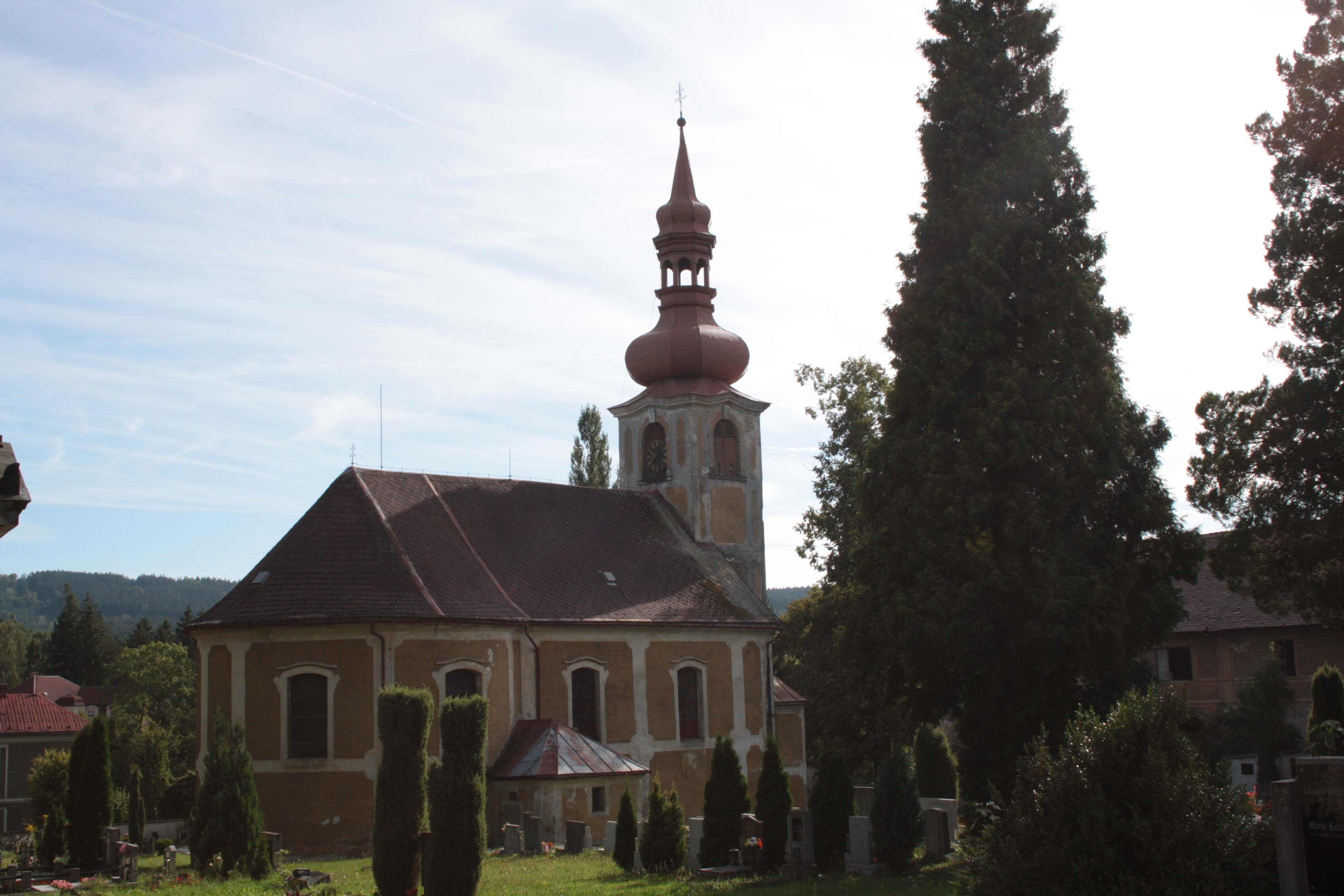 Kostel Nejsvětější Trojice v Jindřichovicích pod Smrkem (pohled od severu).